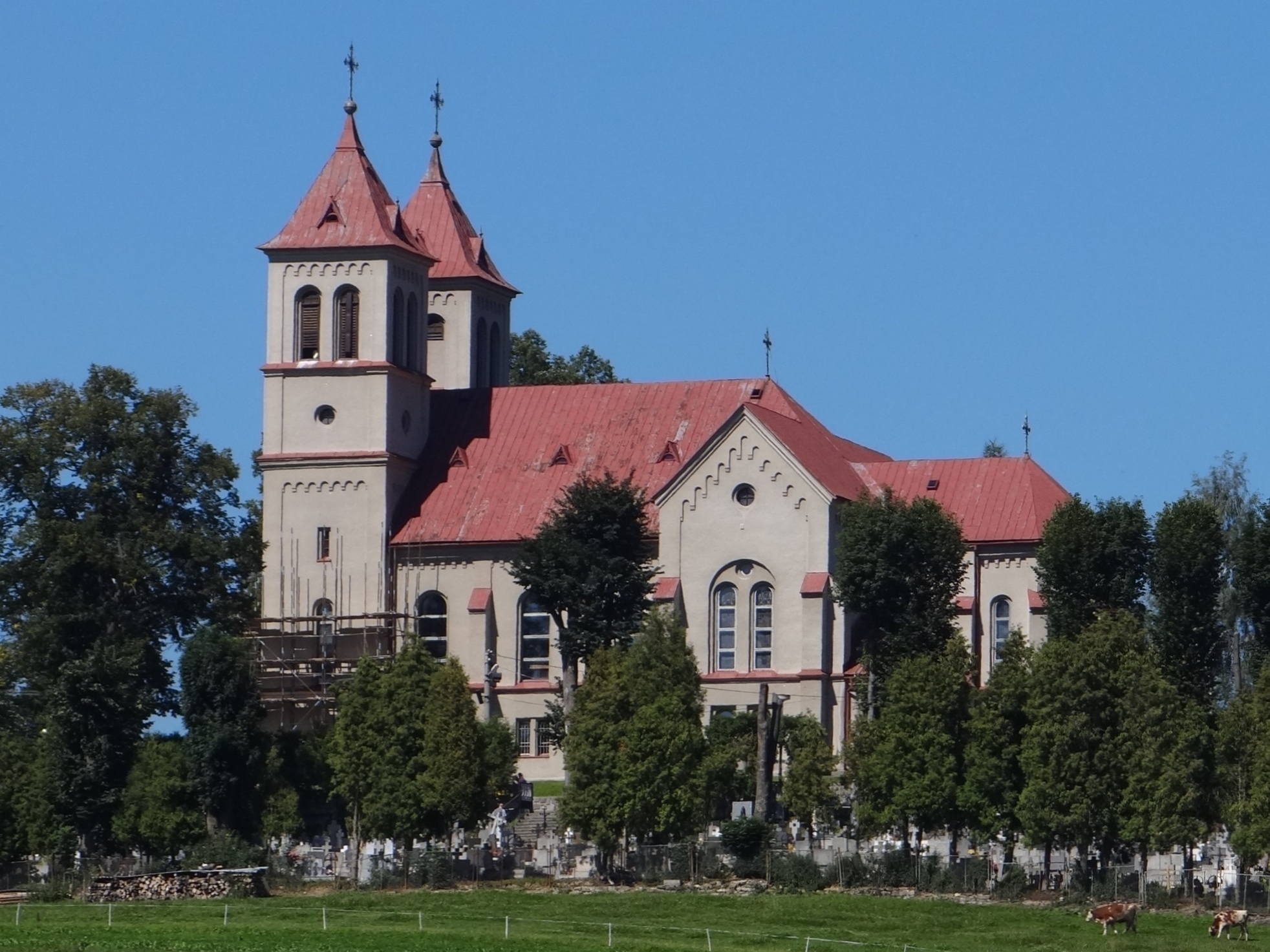 Zákamenné